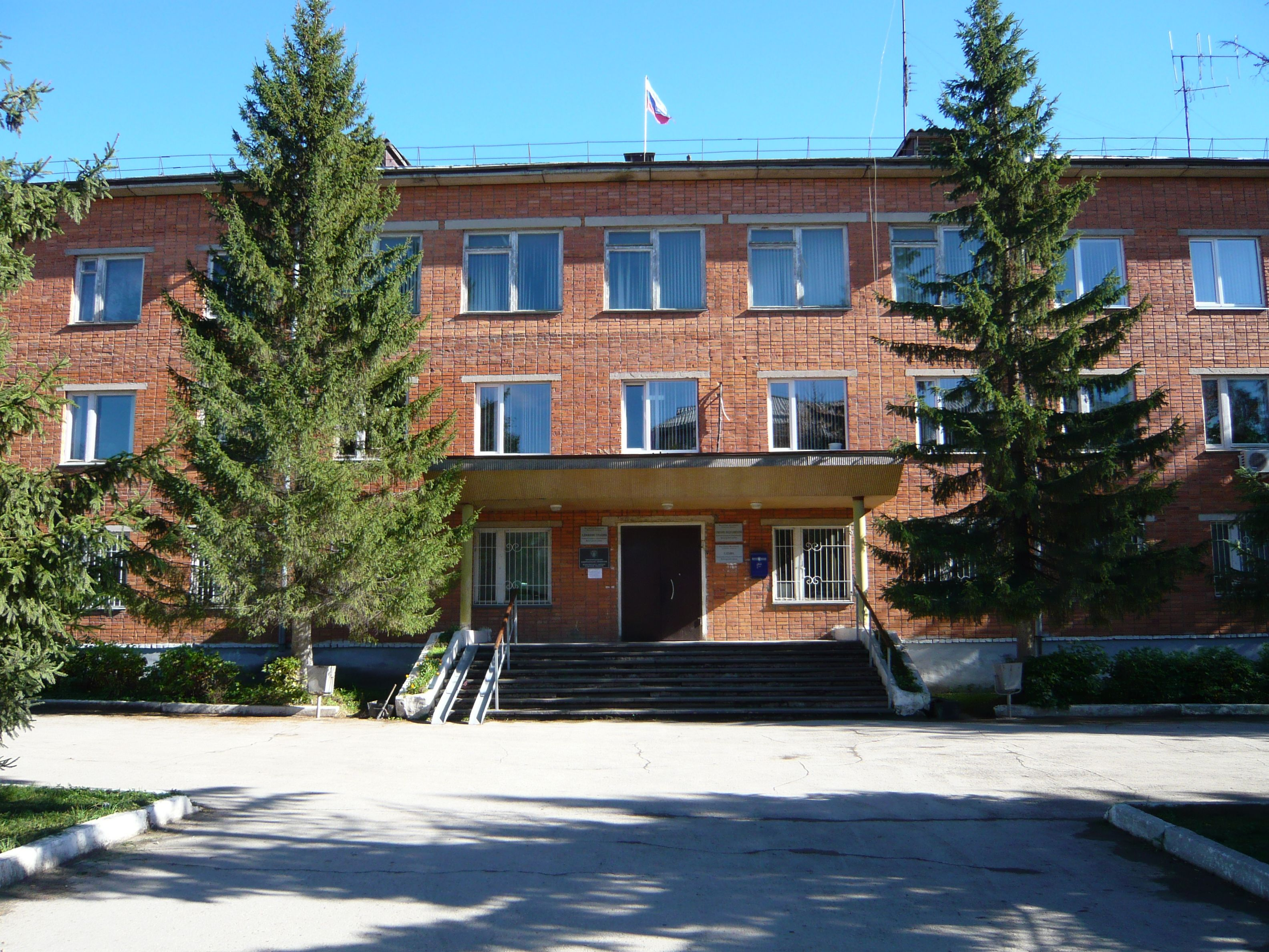 г. Ясногорск, Тульская обл. Здание администрации